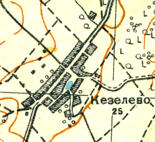 Топографическая карта Ленинградской области, квадрат О-35-24-Б-б (Колхоз Туганицы), деревня Кезелево